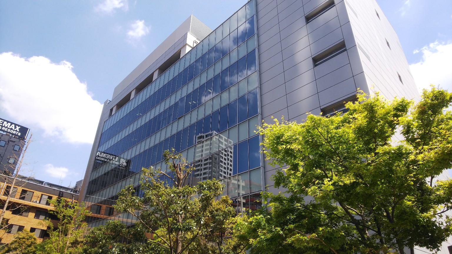 東京都新宿区新宿6-27から北東向きに撮影した新宿スクエアビル。